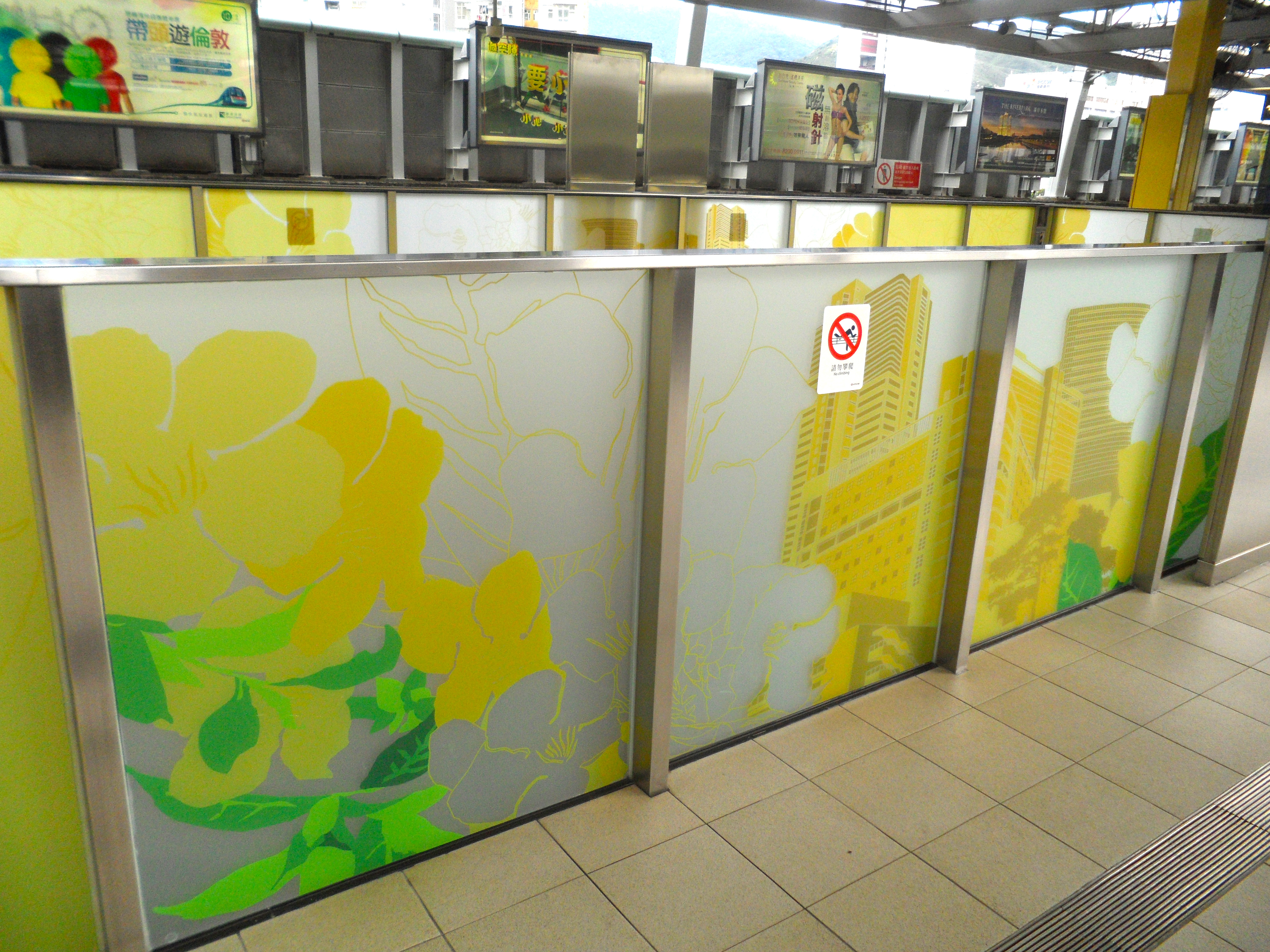 港鐵石門站月台佈置